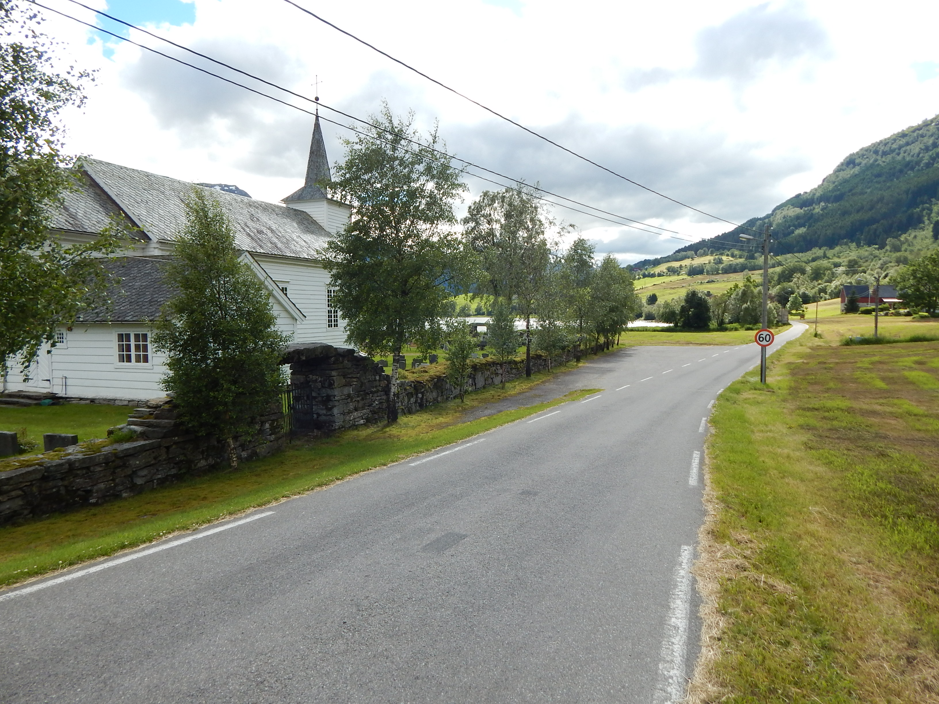 Roskevegen (fylkesvei 5673, tidl. 421) forbi Viksdalen kirke